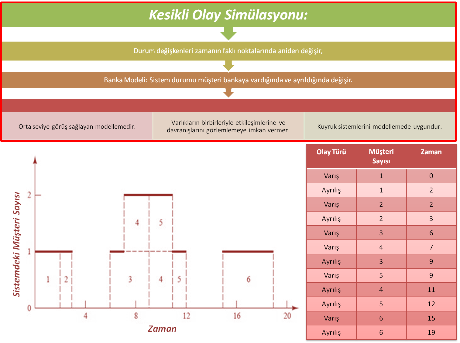 Kesikli Olay Simülasyonu